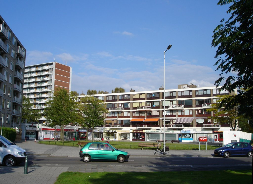 The Kreekplein in the deelgemeente IJsselmonde, district Kreekhuizen in Rotterdam.